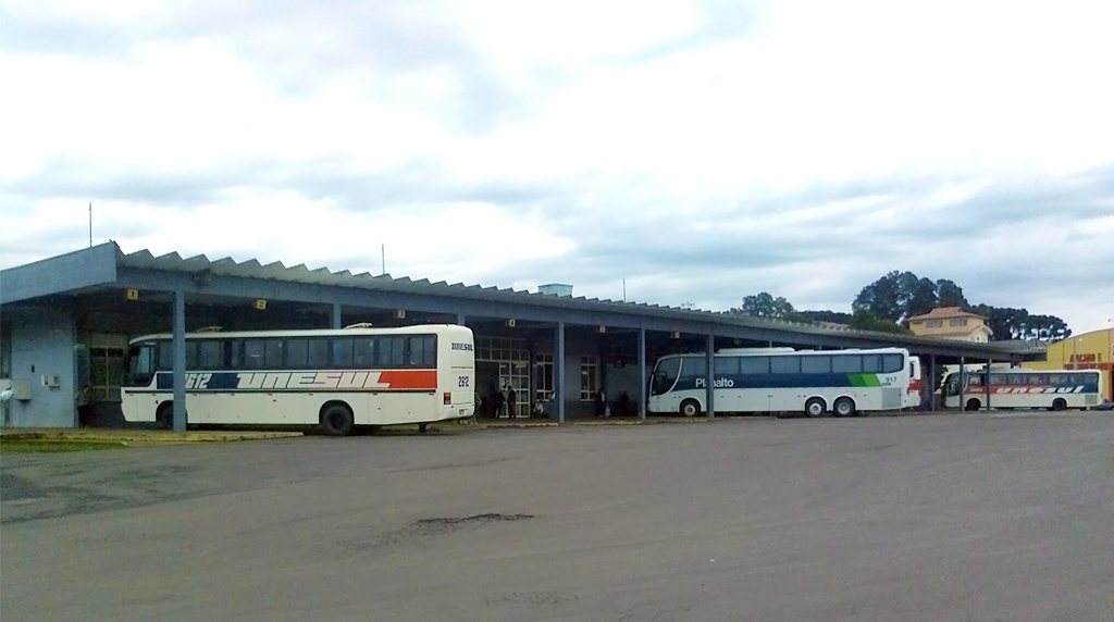 Foto do terminal rodoviário de Passo Fundo/RS.